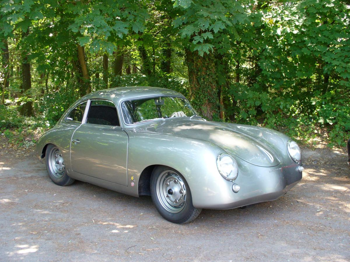 Porsche 356 Coupe